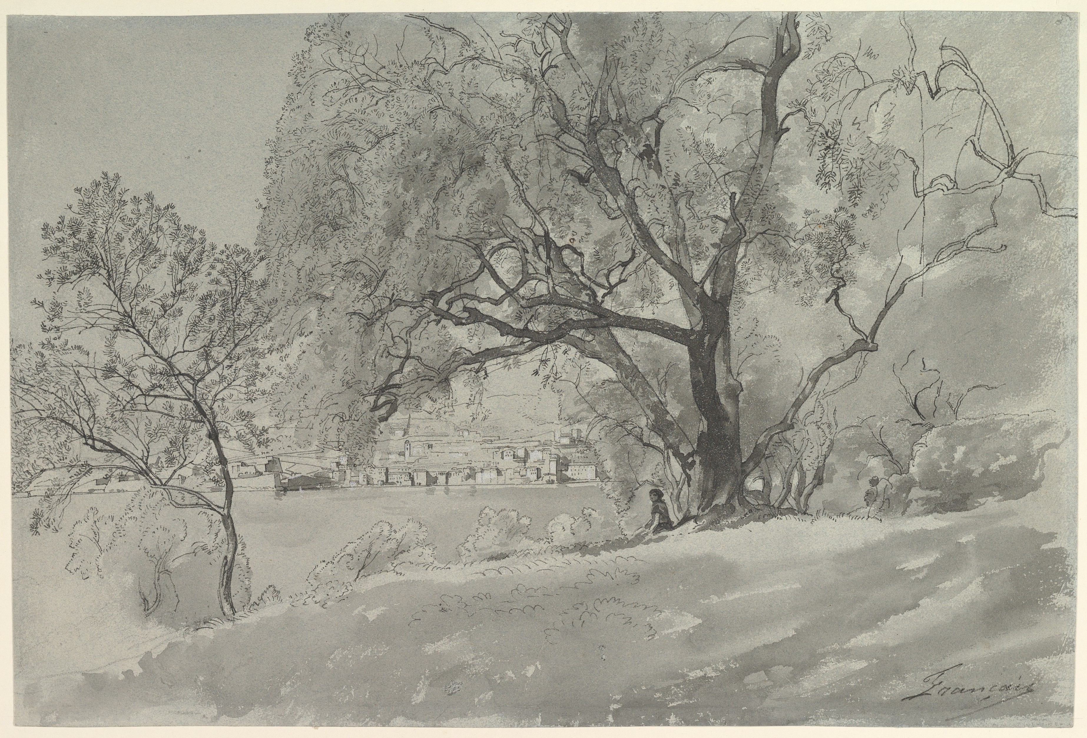 Drawing; Drawings